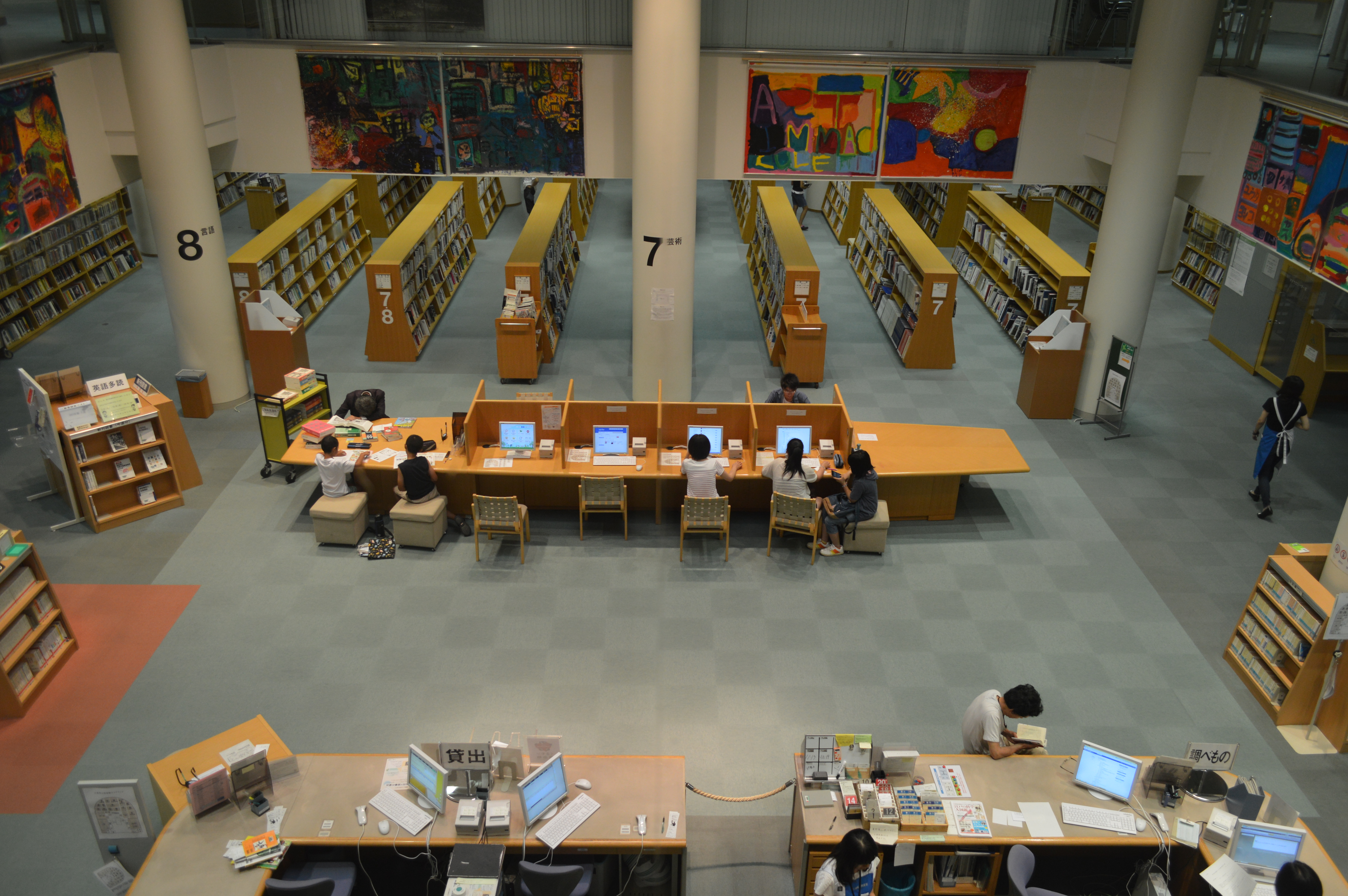 三重県立図書館。